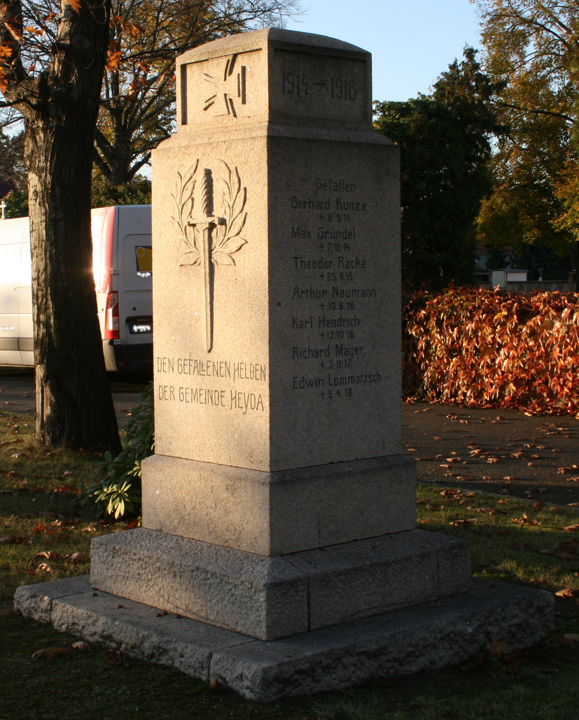 Gefallenendenkmal in Heyda(Hirschstein)